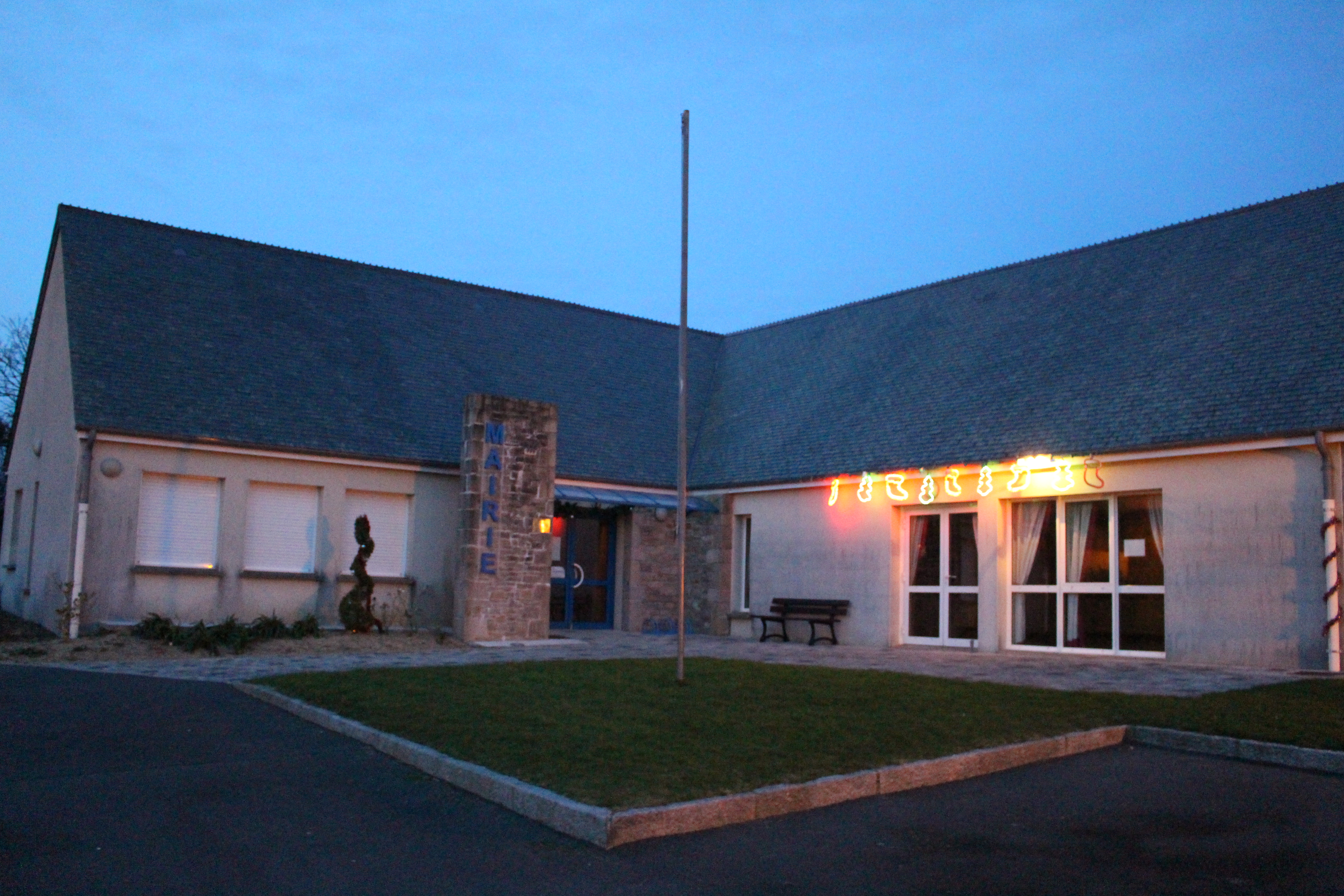 Branville-Hague, Manche